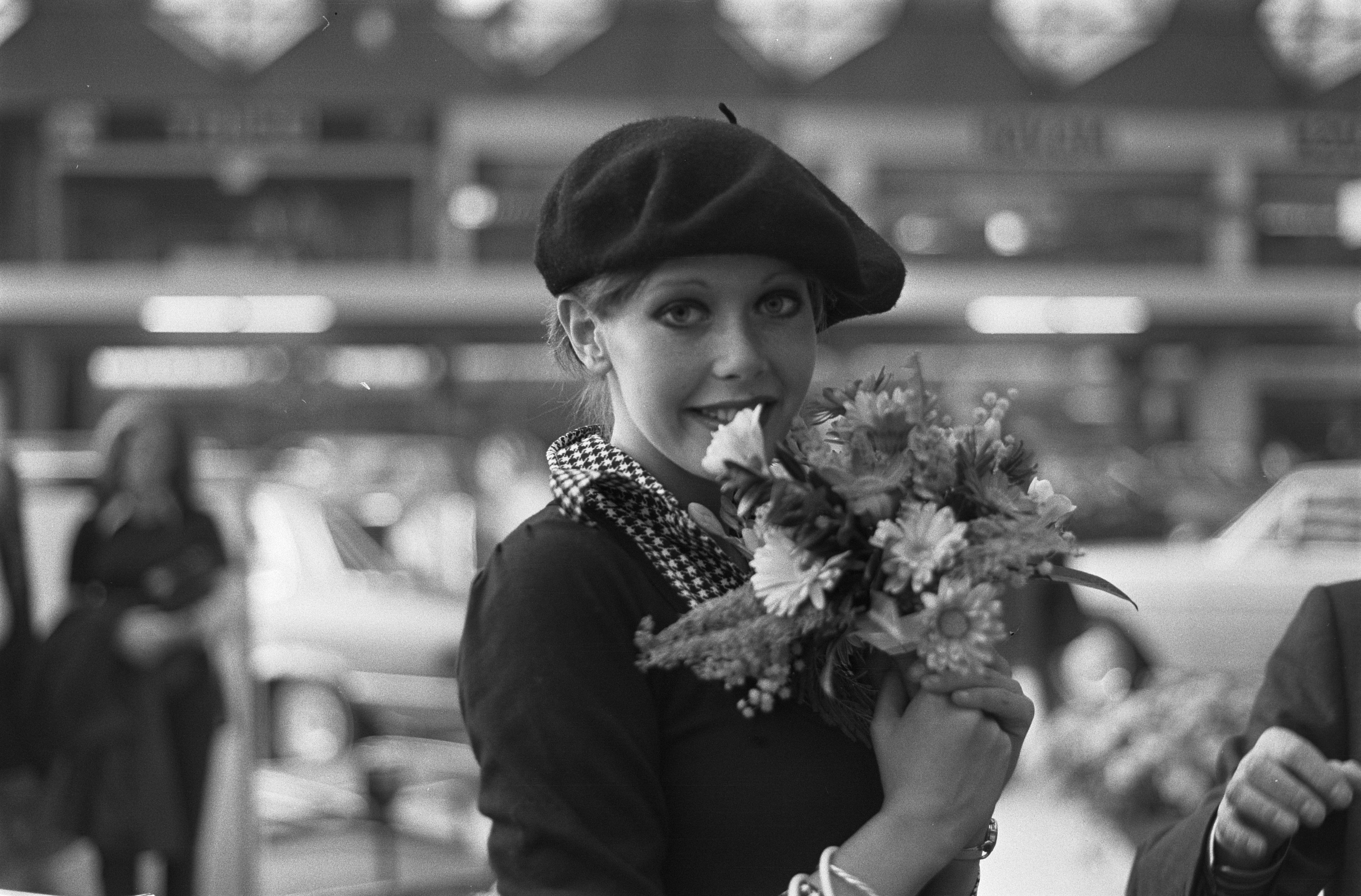 Sylvia Kristel, die op 4 januari 1973 werd uitgeroepen tot Miss TV Europe, krijgt een Mercedes 350SL tijdens de Personenauto RAI (8 t/m 18 februari 1973).